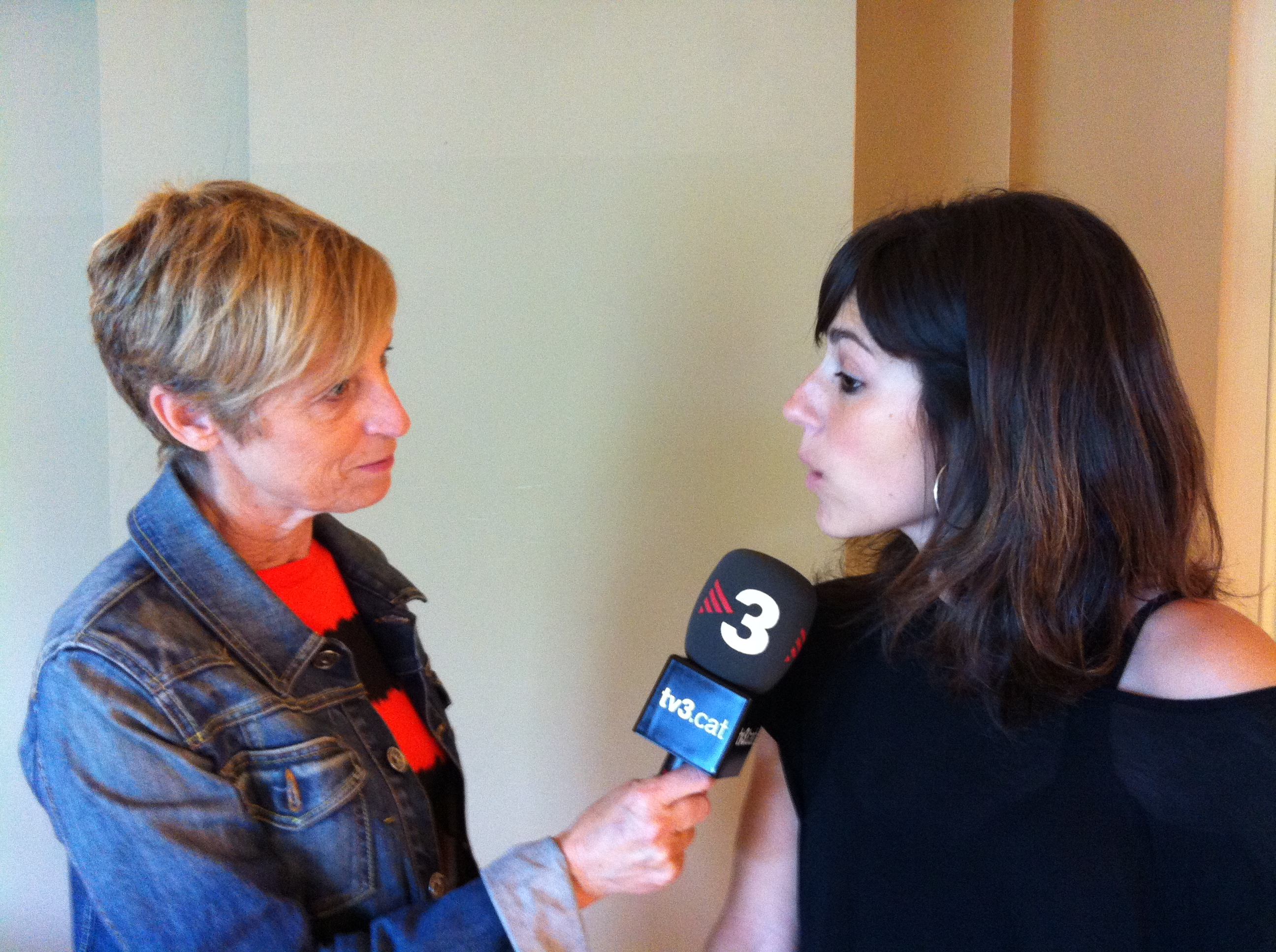 Maria Josep Soler durant una entrevista al MNAC- els matins tv3